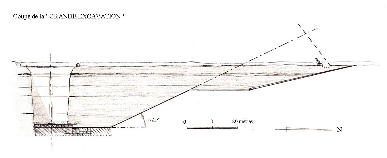 Coupe de la grande excavation de zaouiet el-aryan